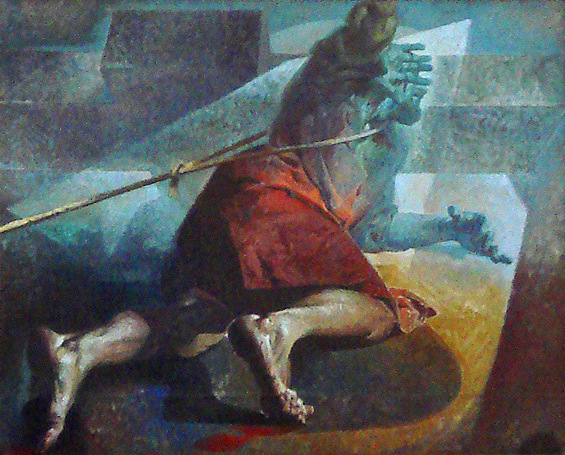 Via Crucis na Igreja de São Pelegrino, Caxias do Sul, Brasil.